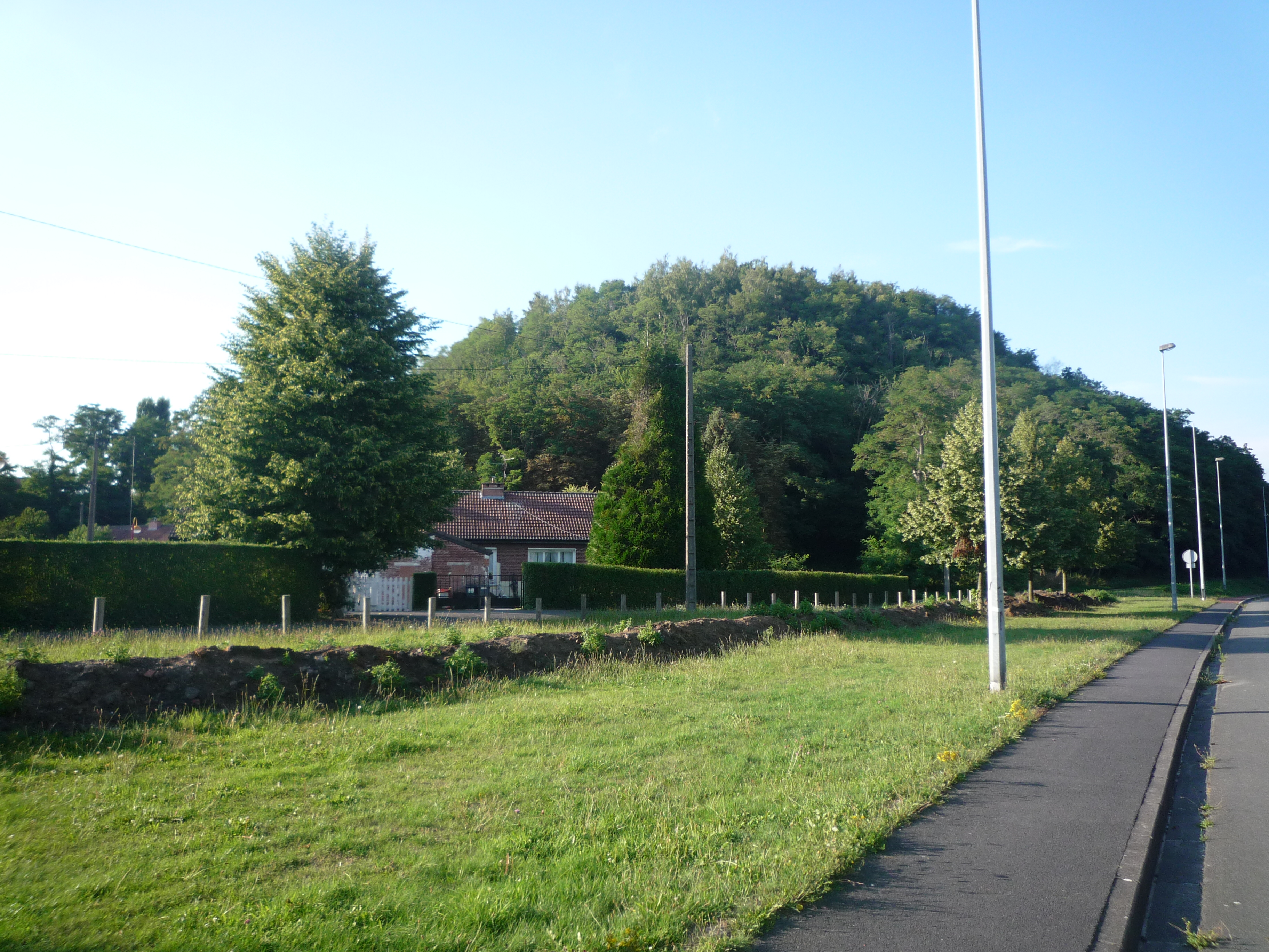 Anzin, Nord, Nord-Pas-de-Calais, France.